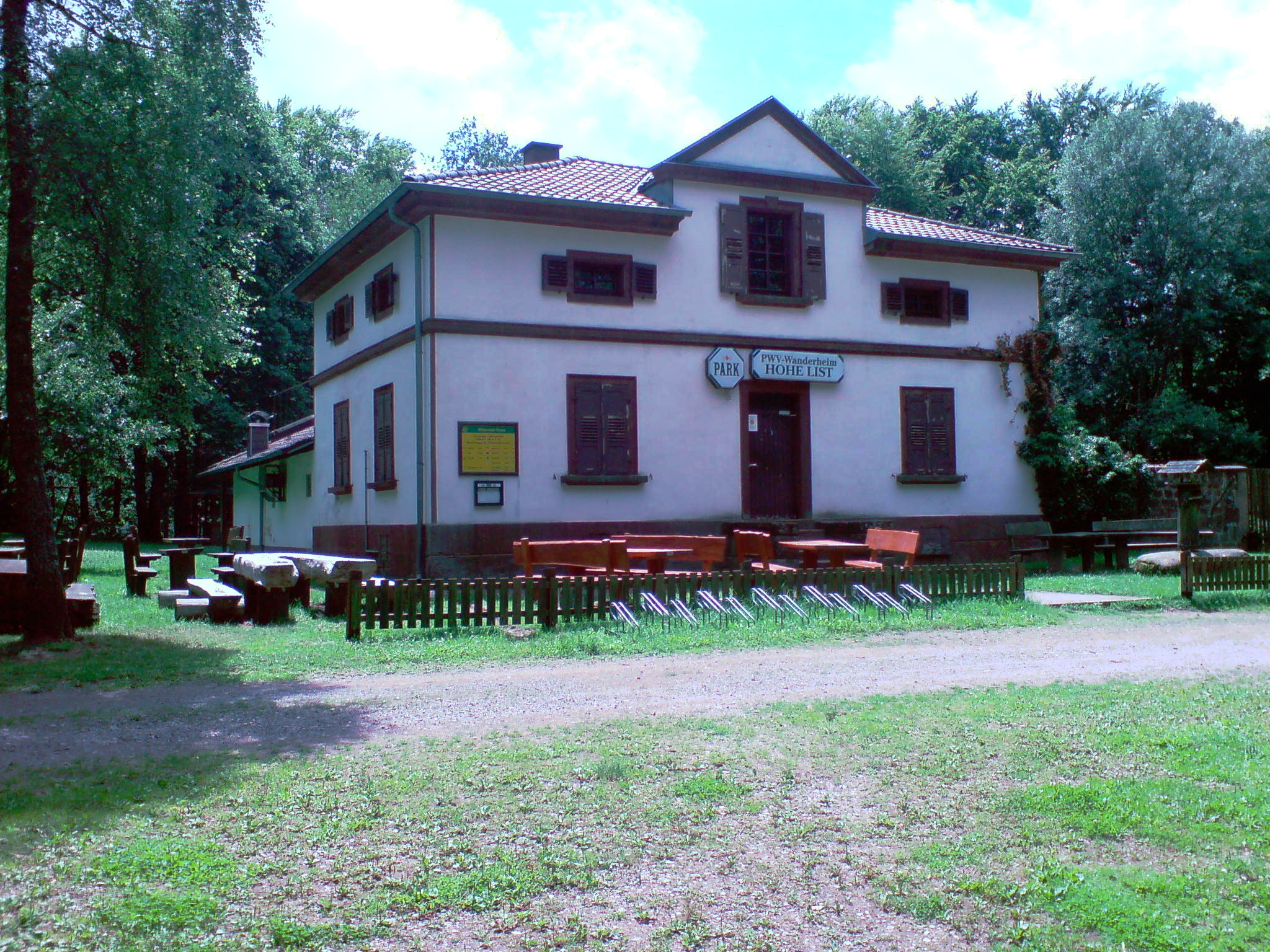 Das Wanderheim Hohe List bei Ludwigswinkel.